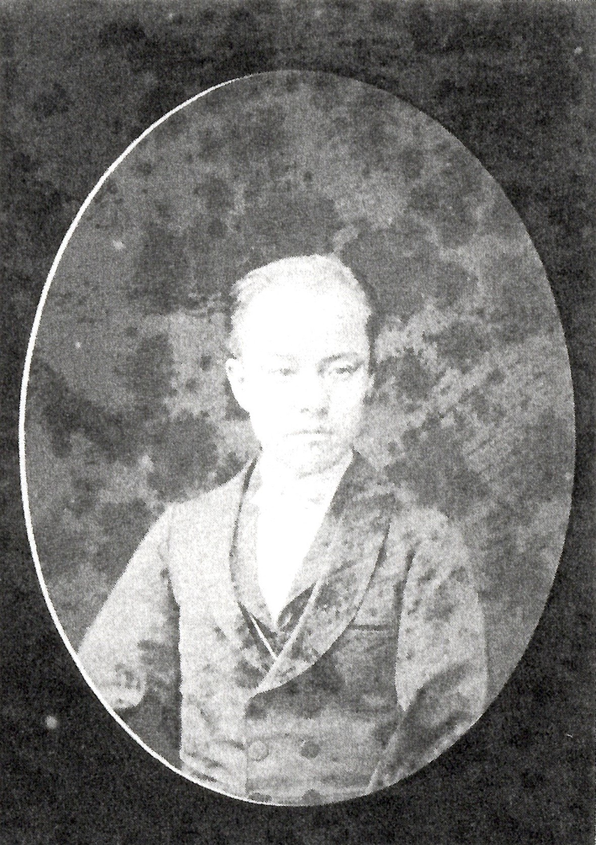 酒井忠経の肖像写真。